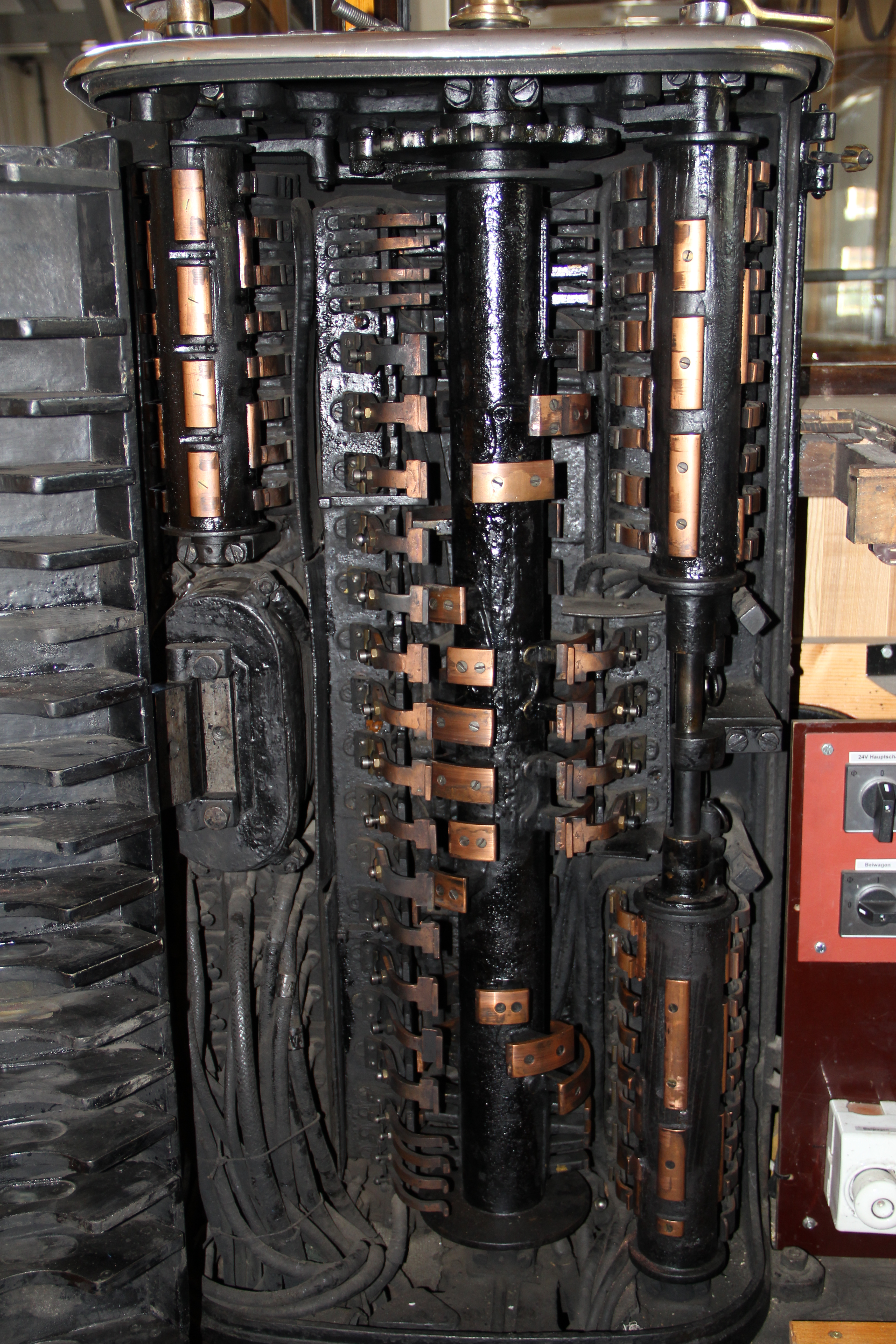 Fahrschalter eines Triebwagen der Lokalbahn Innsbruck–Hall in Tirol